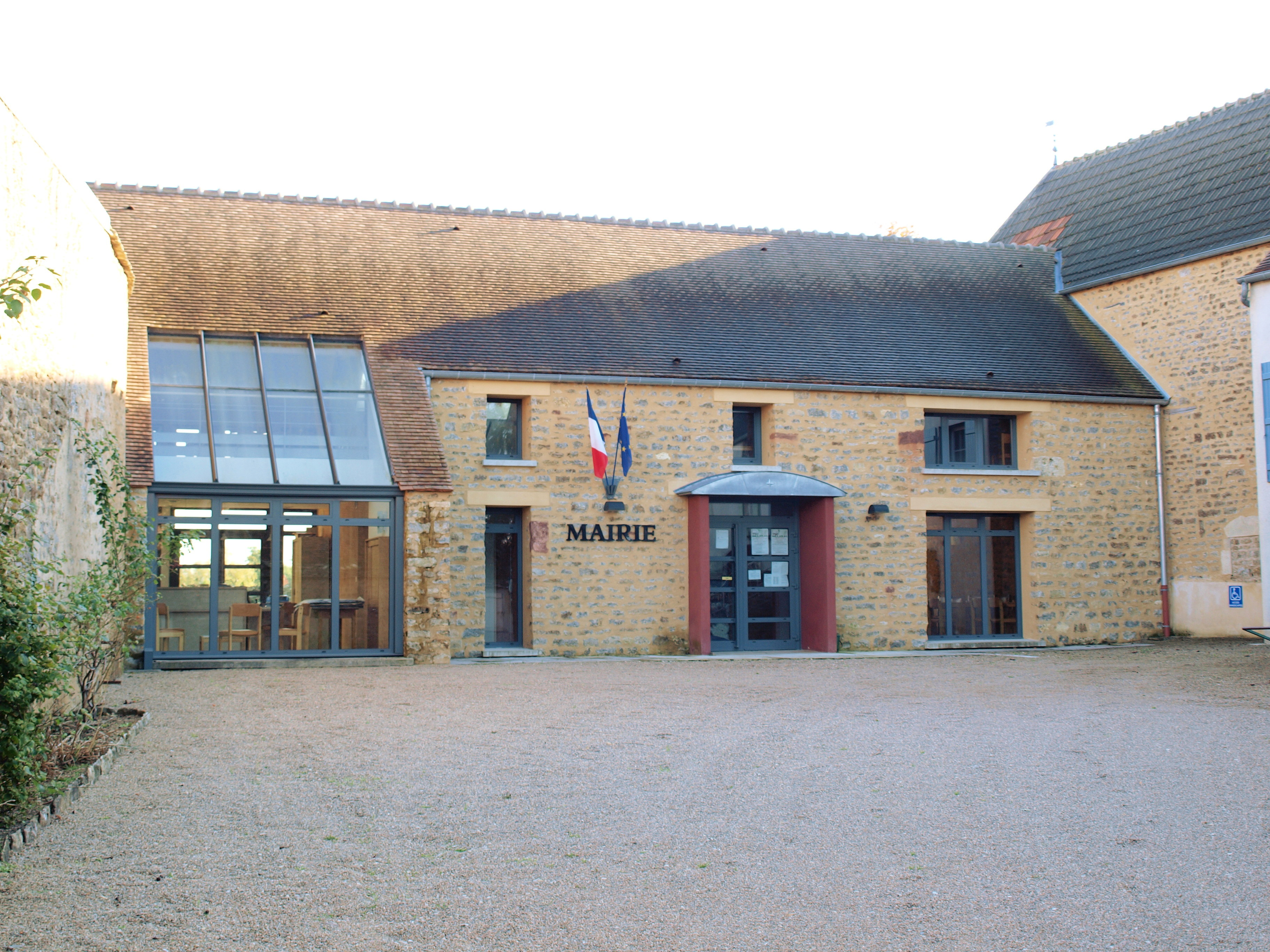 Savigny-en-Terre-Plaine (Yonne, France)